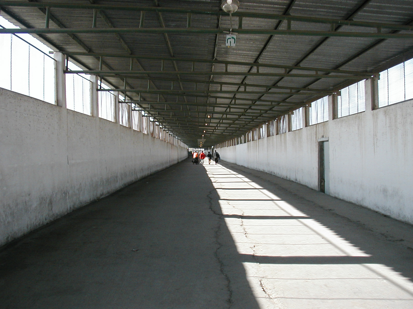 Passage du point de frontiere entre Gaza et Eretz.